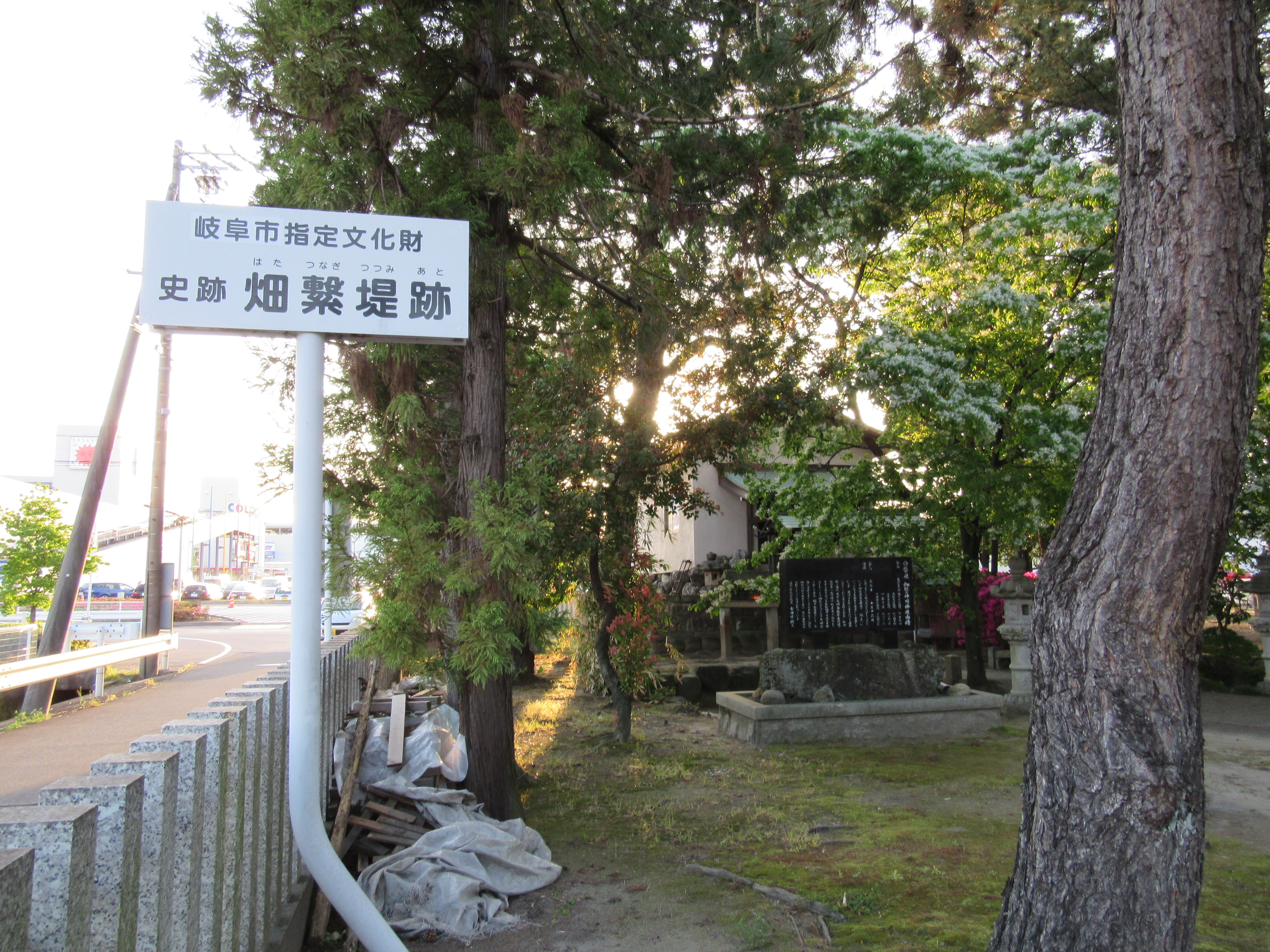 畑繋大神宮内、畑繋堤跡の表示